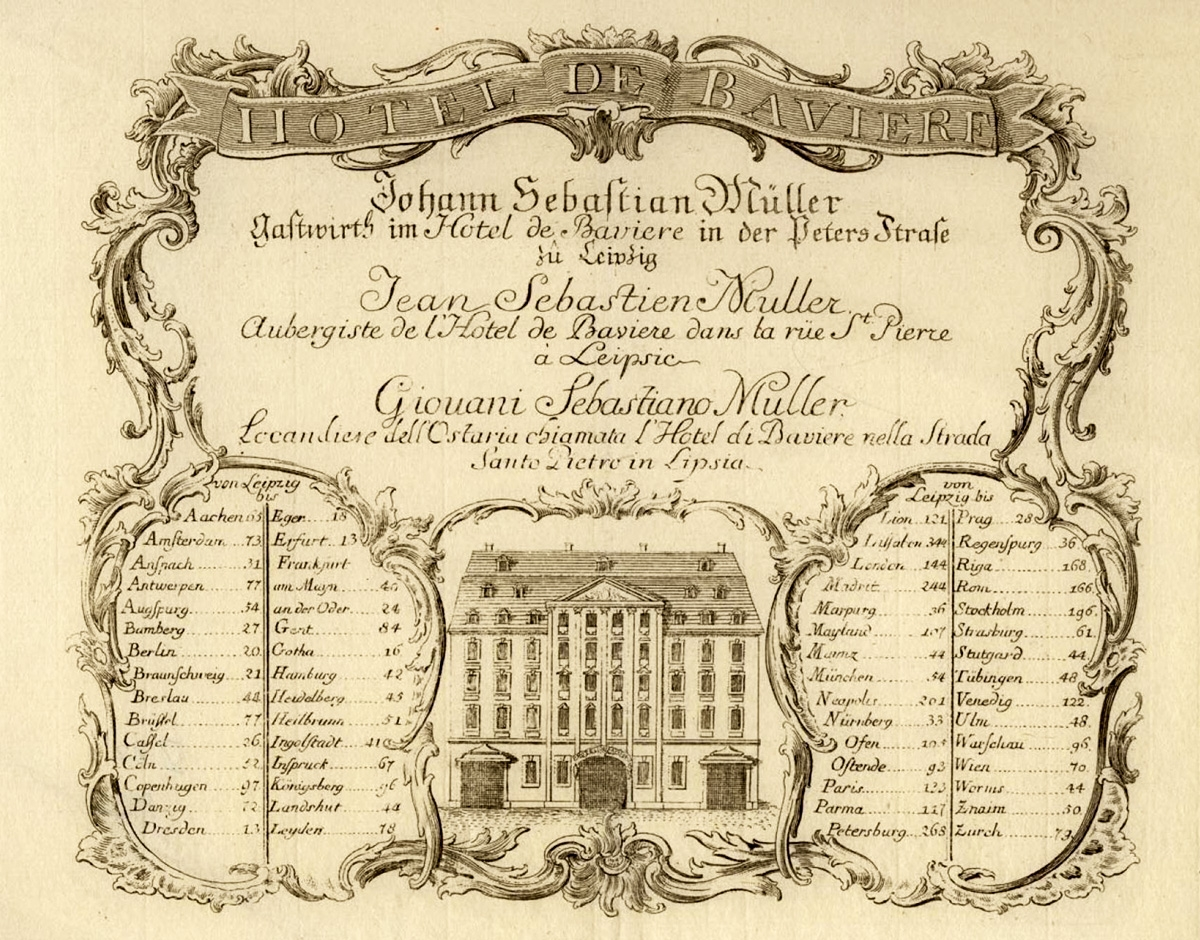 Prospekt des Hotel de Baviere in Leipzig, mit Entfernungsangaben zu verschiedenen Städten in Stunden. Stich von Johann Michael Stock